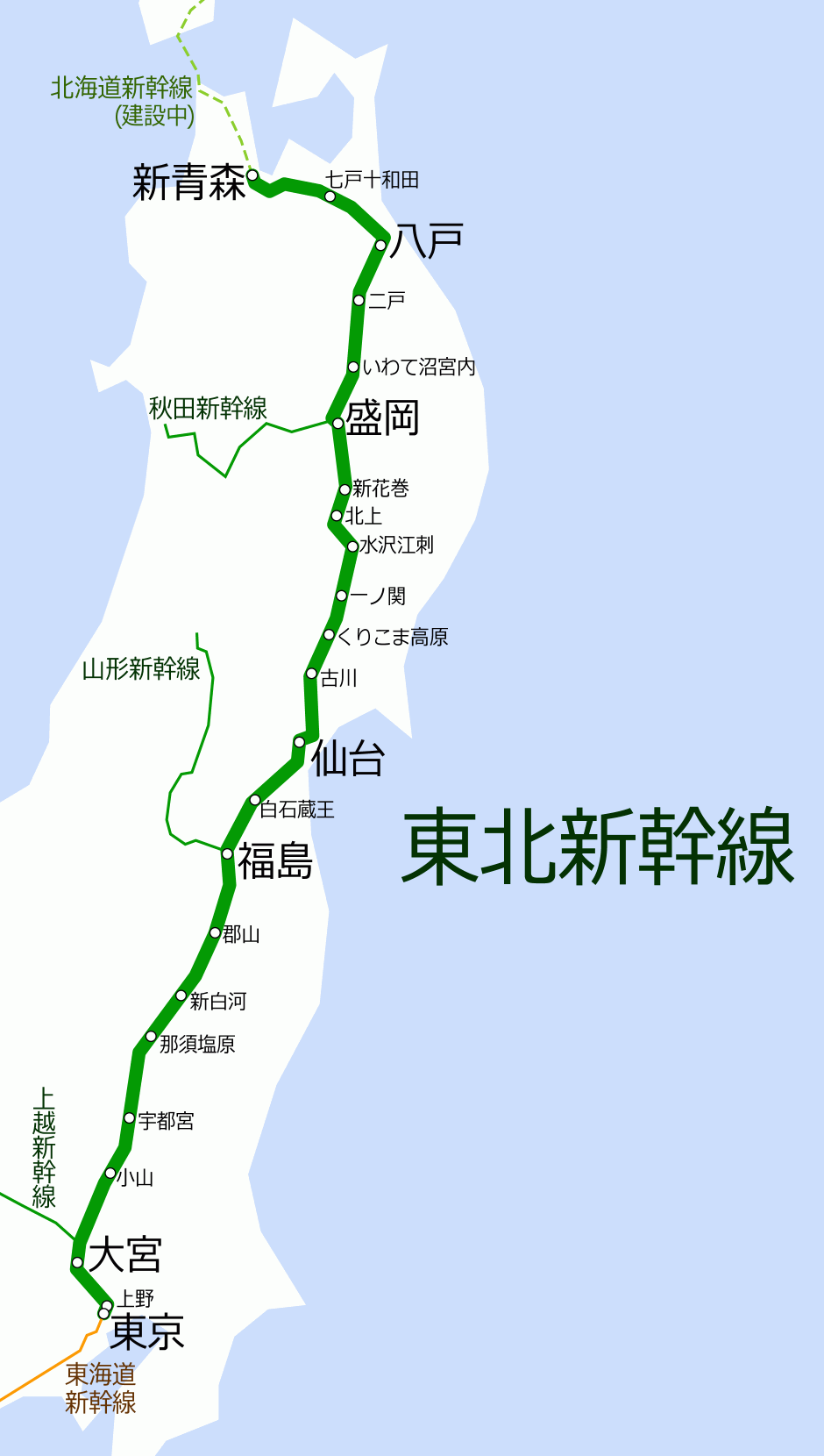 東北新幹線の路線図 (2010年12月4日現在)